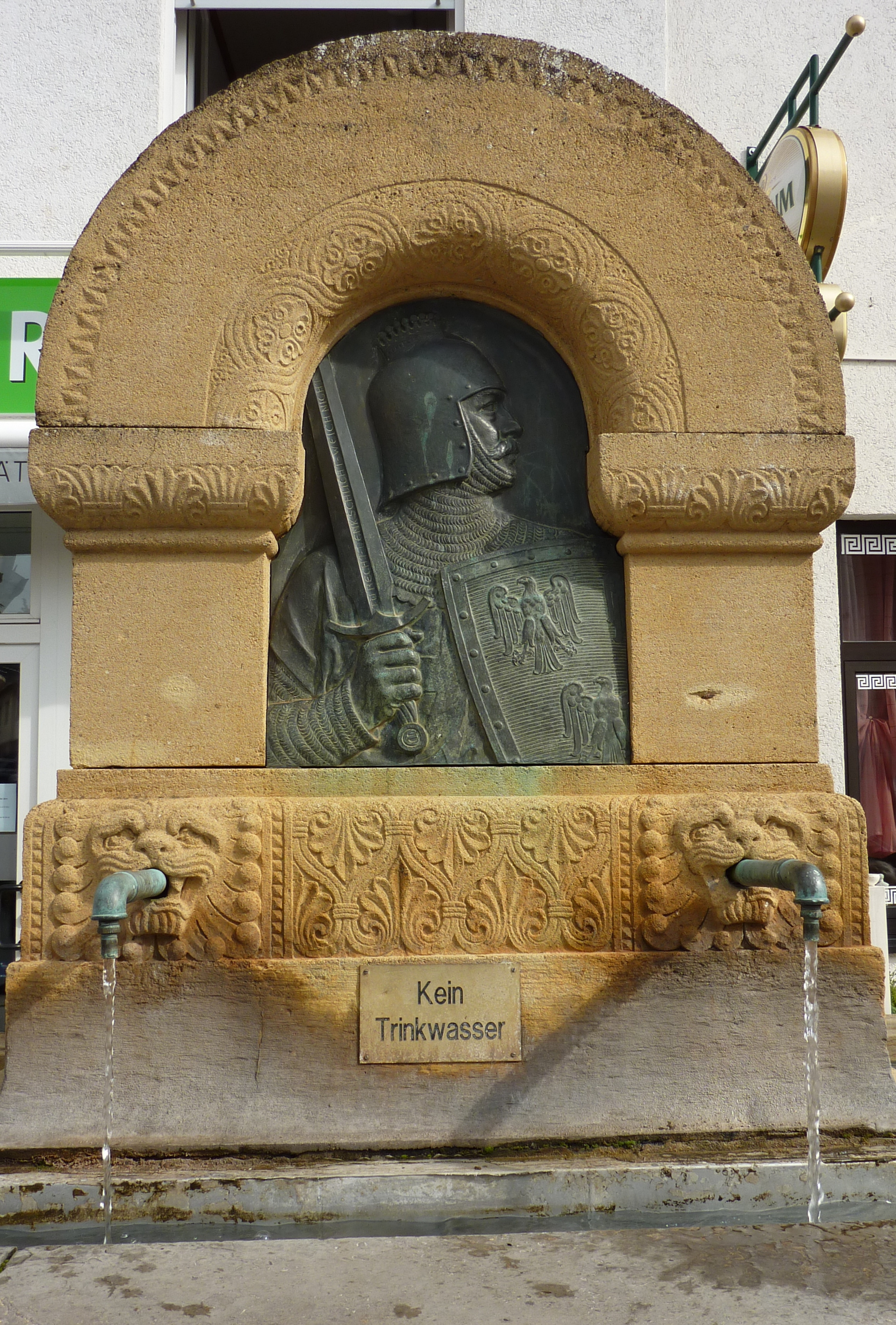 Emrichbrunnen: gründerzeitlicher Laufbrunnen mit Bronzerelief, bezeichnet 1913